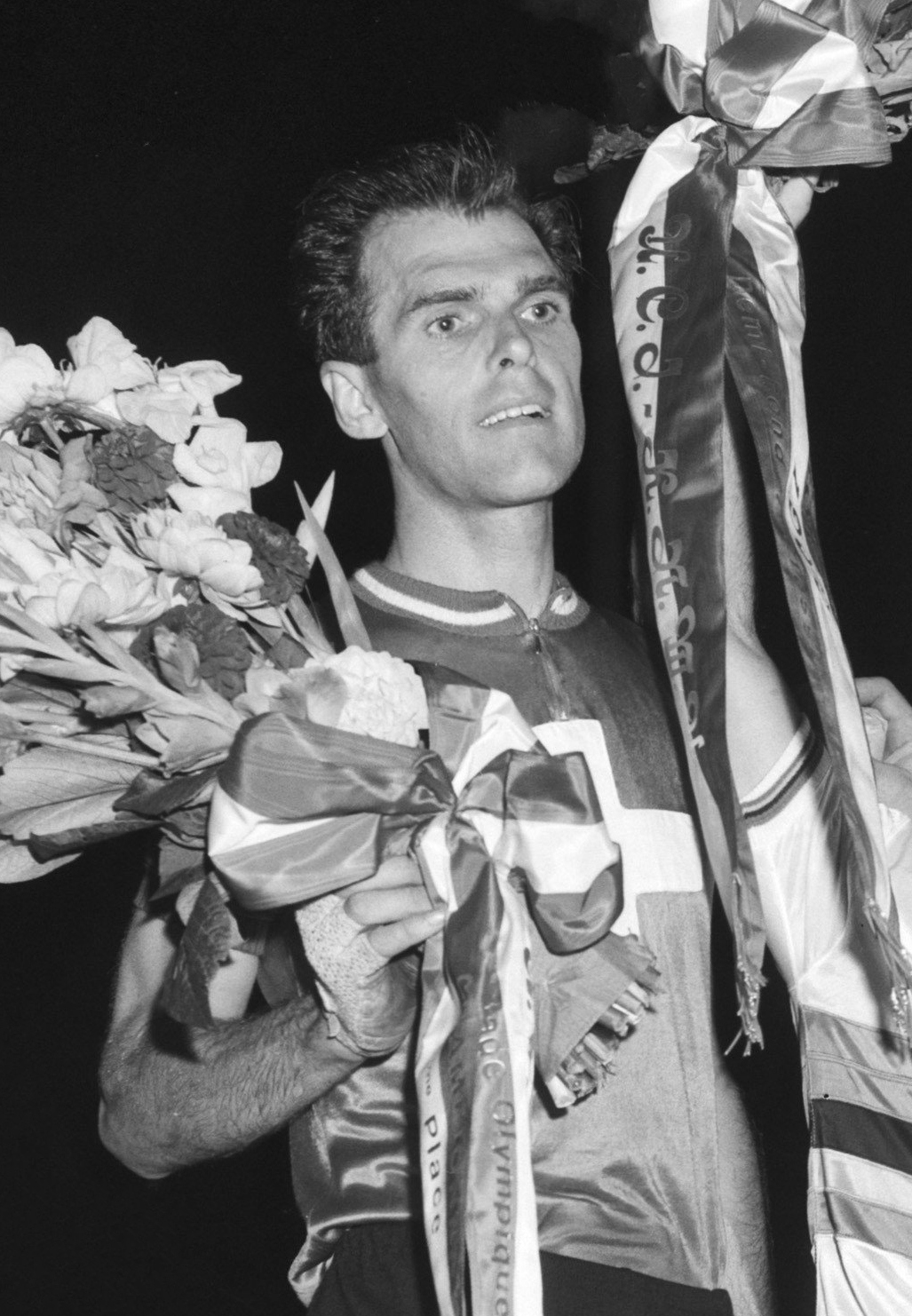 Wereldkampioenschap wielrennen op de baan in Amsterdam. Bucher